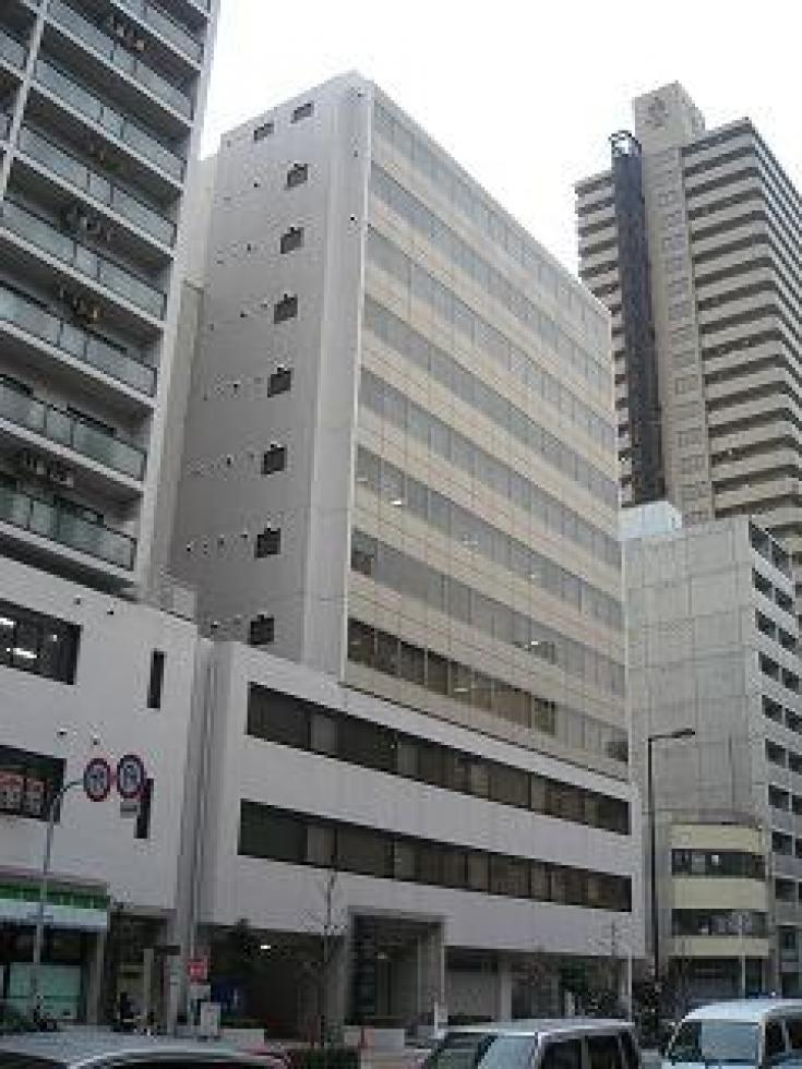 本社所在地のグレーシィ天神橋ビル